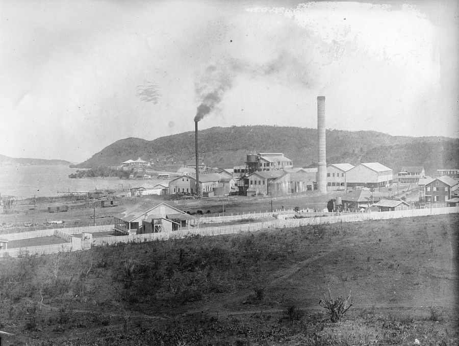 Central Guanica, located in Guanica, Puerto Rico